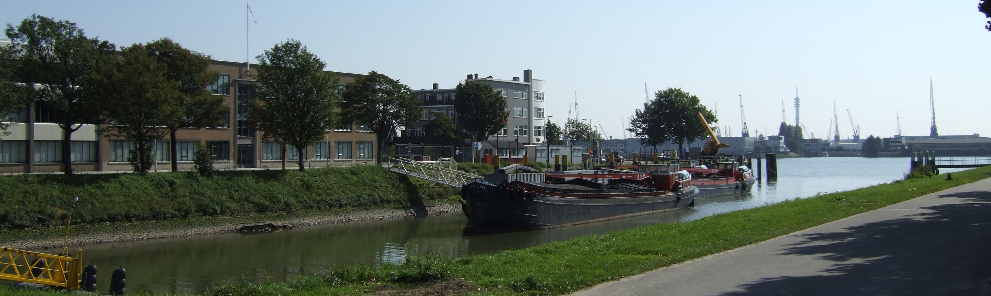 Schiemond Rotterdam, 10 september 2006